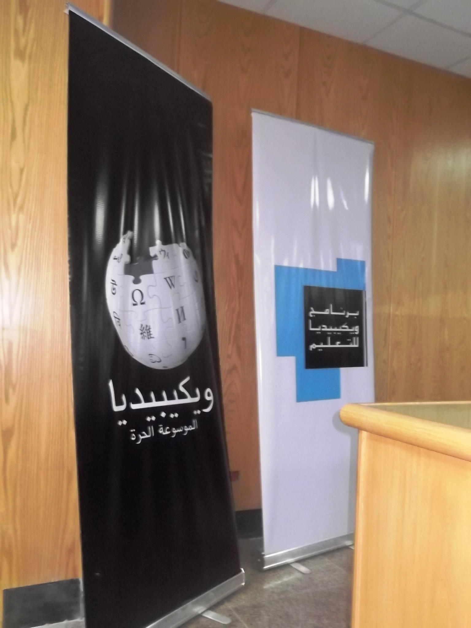 المؤتمر الختامي للنسخة الثالثة من برنامج ويكيبيديا للتعليم.